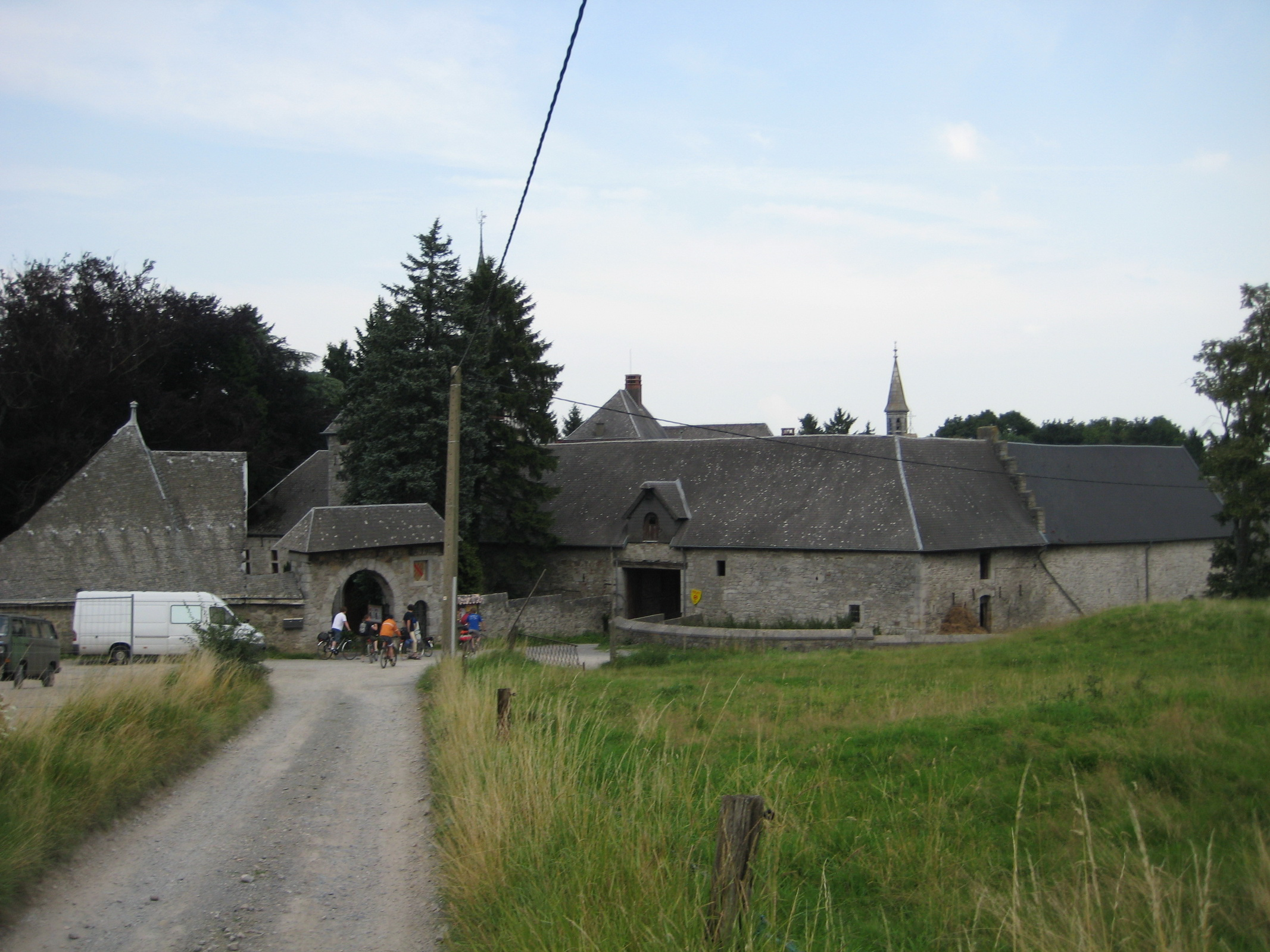 Eyneburg (Emmaburg) in Hergenrath